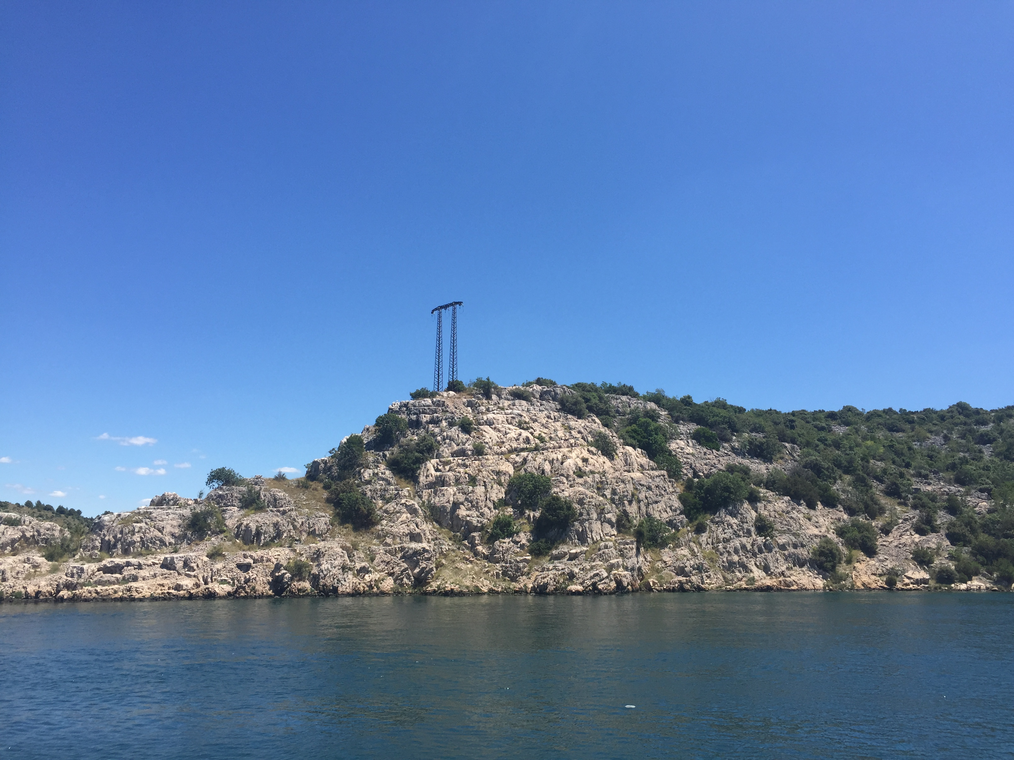 Općina Šibenik, Croatia